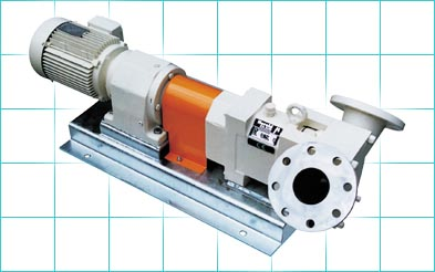 Bild einer Drehkolbenpumpe mit v-förmigen Ein- und Auslass